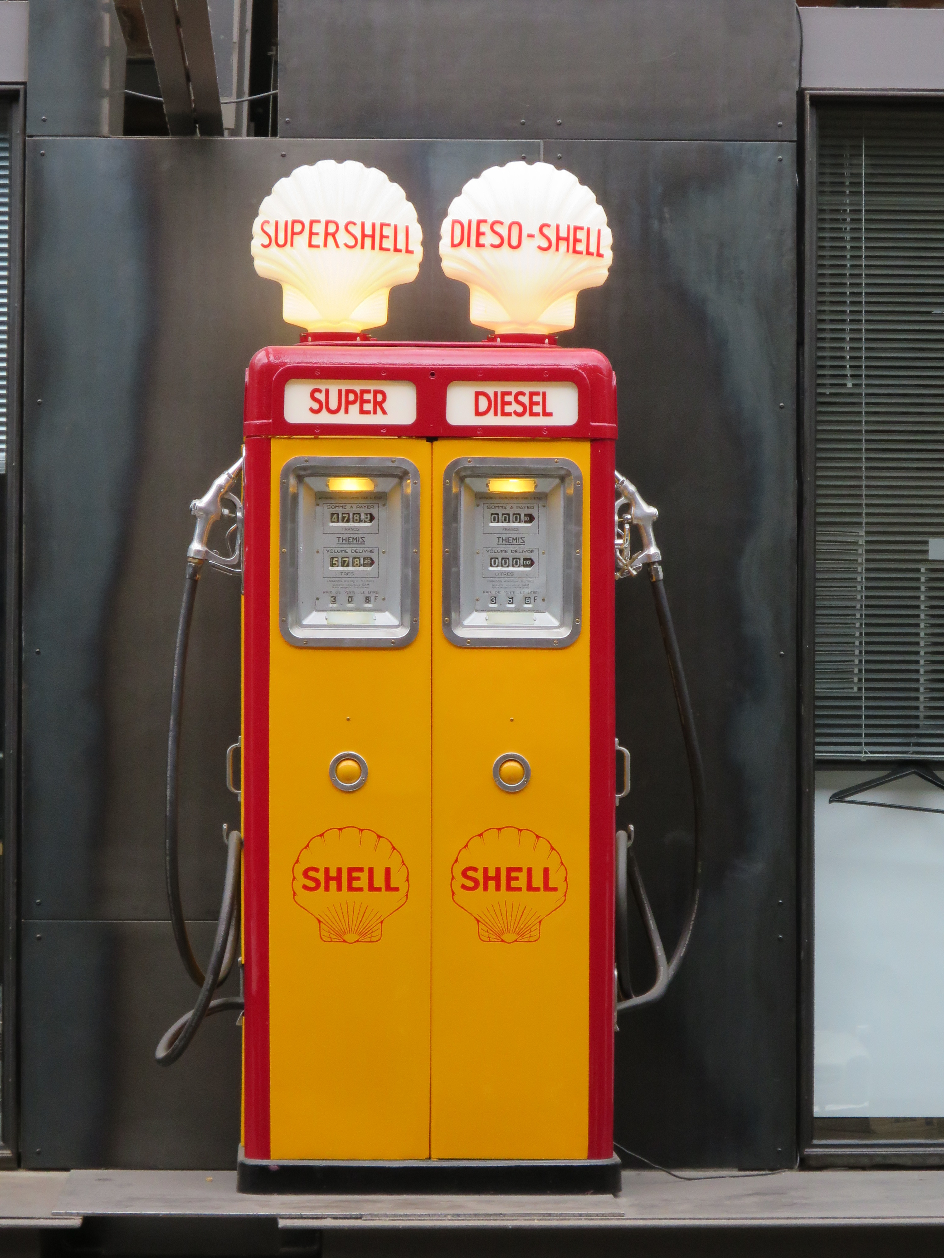 Themiz 1952, Frankreich